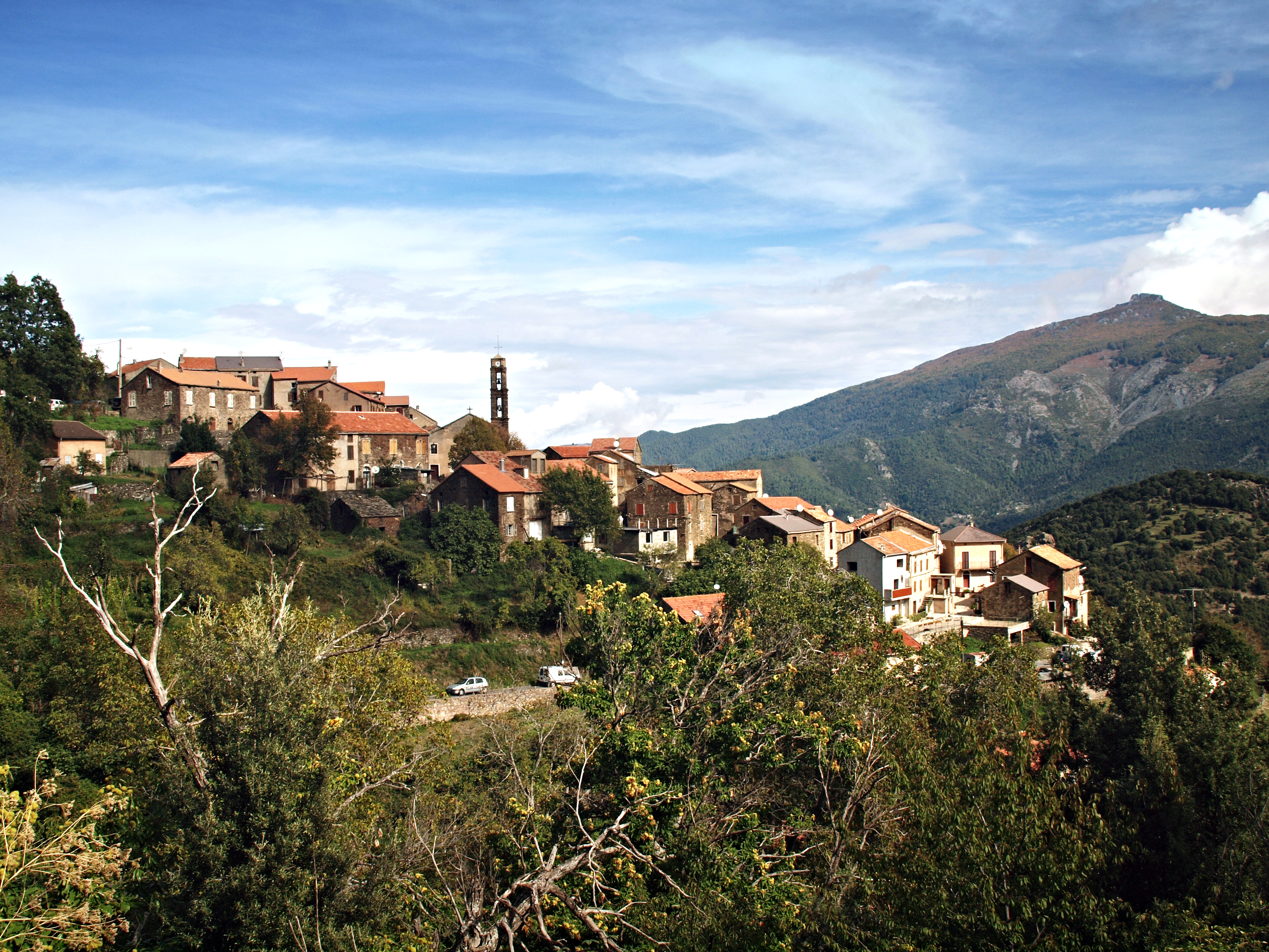 Rusio, Casaluna (Corse) - Vue du village